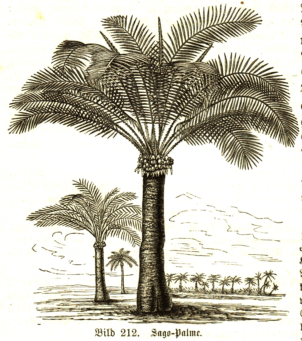 Sagopalme